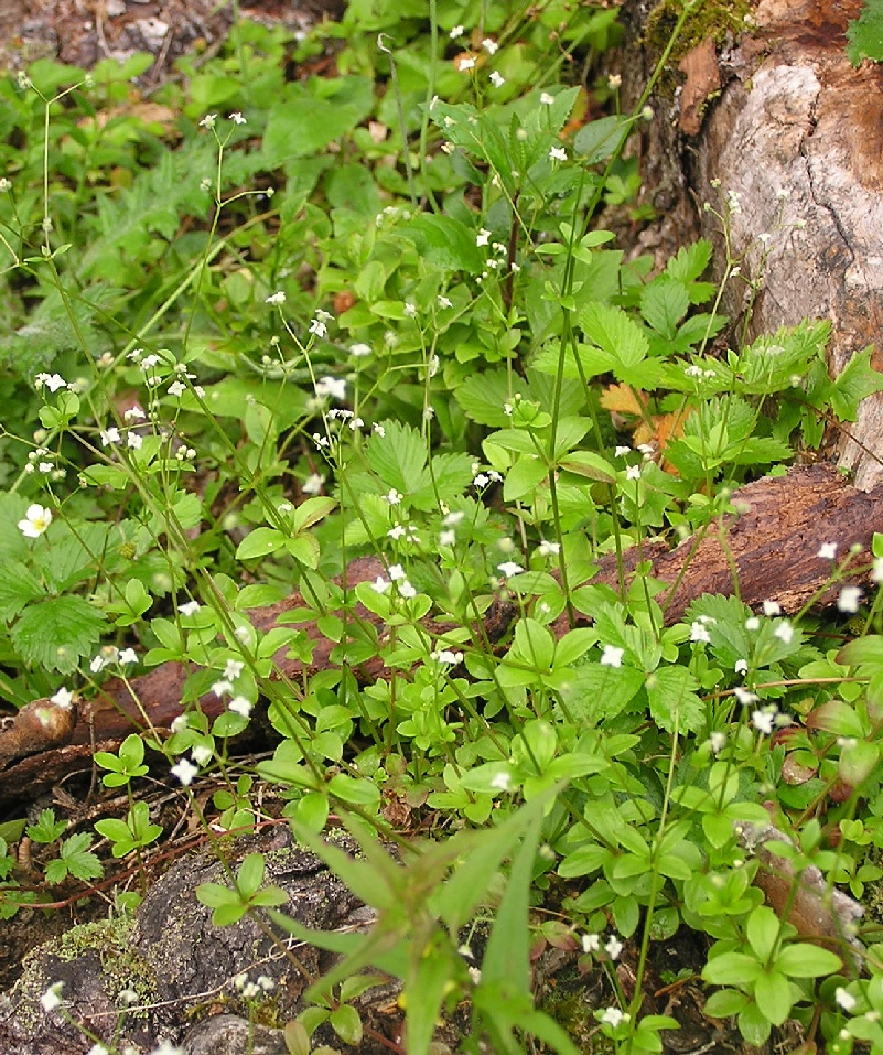 Galium rotundifolium, aufgenommen in der Nähe von Filzmoos (Österreich).